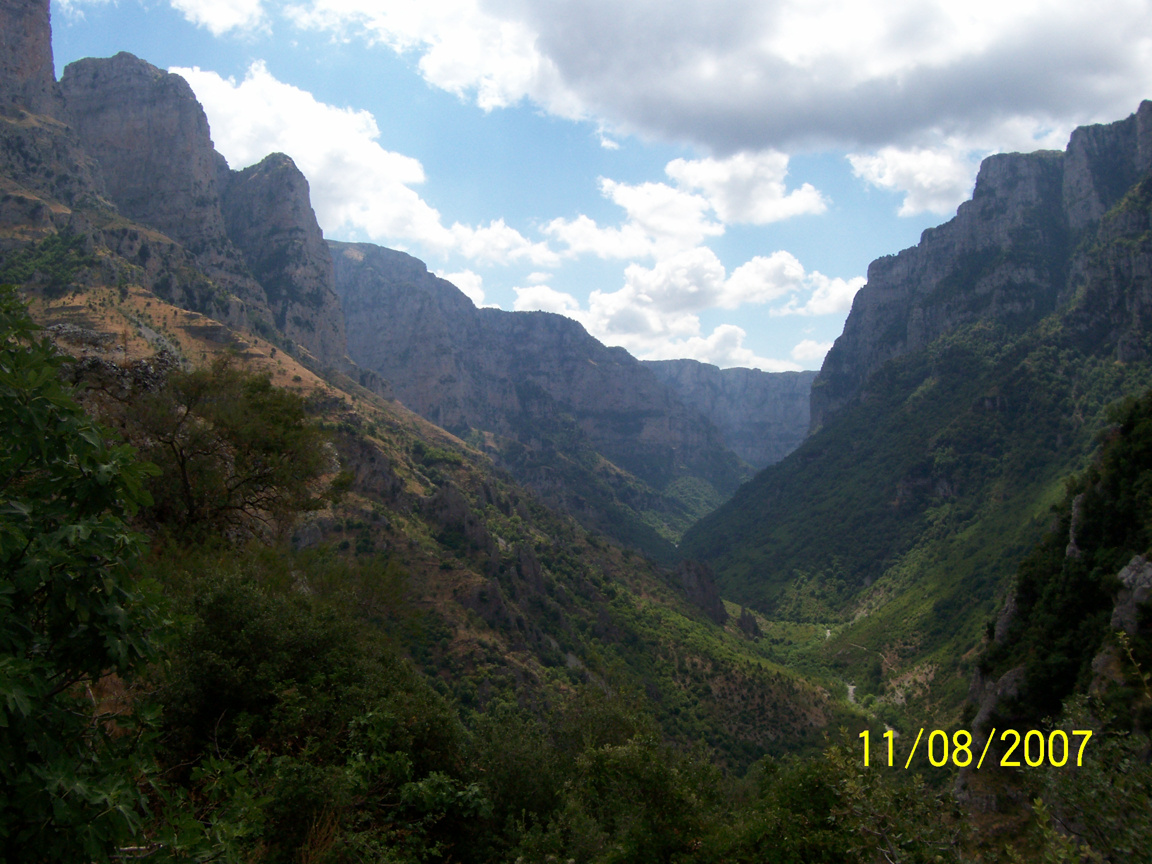 Φαράγγι του Βίκου, από το χωριό Βίκος This is a photography of Natura 2000 protected area with ID GR2130001